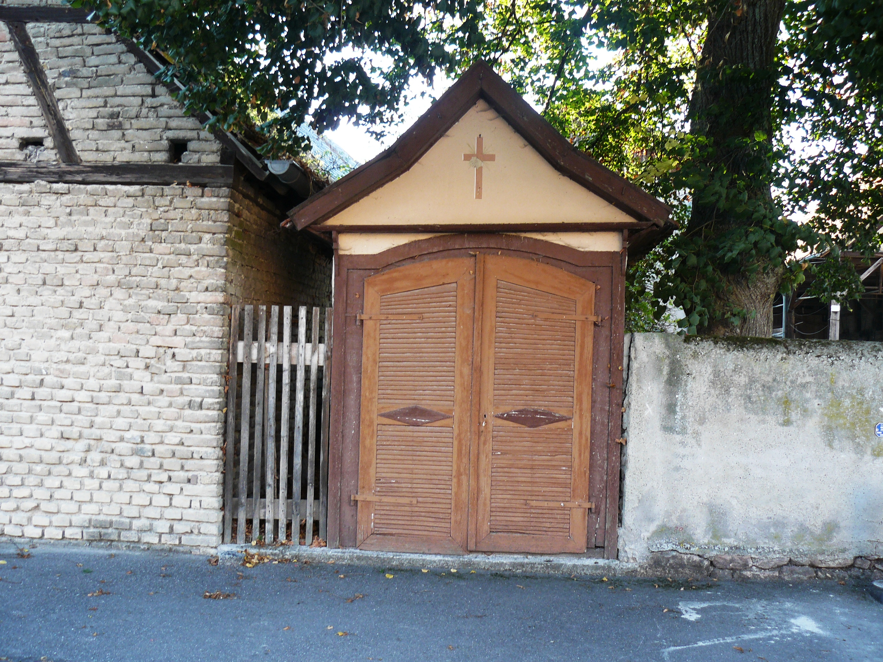 Chapelle rurale fermée